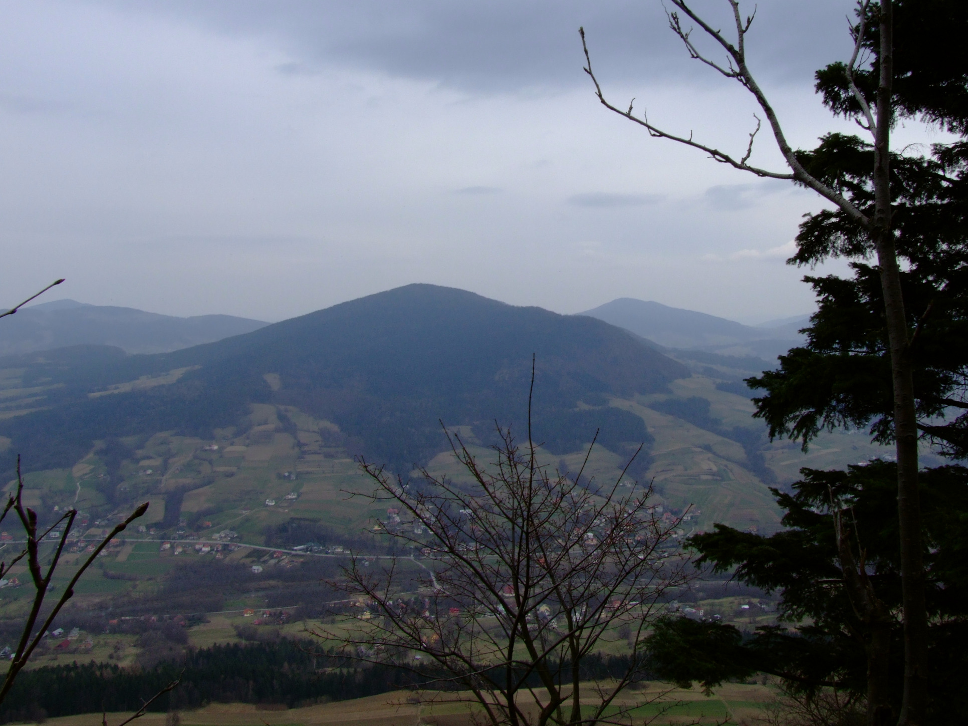 Widok ze Szczebla (Beskid Wyspowy) na Kiczorę (Beskid Makowski)